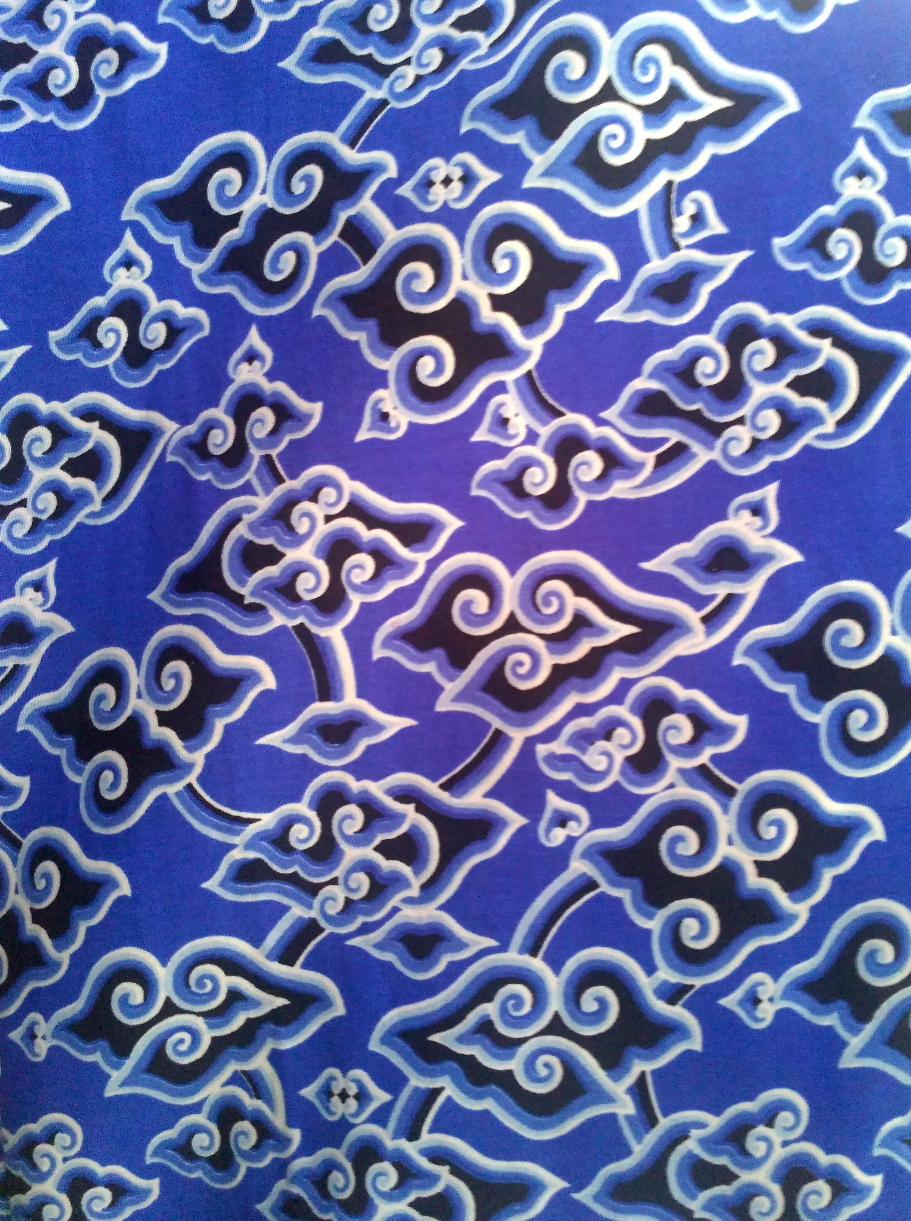 Batik Mega Mendung, dipotret dari kain penutup sandaran kursi kereta api Indonesia. Jawa: ꦧꦠꦶꦏ꧀ꦩꦺꦒꦩꦼꦤ꧀ꦢꦸꦁ꧈ꦢꦶꦥꦸꦤ꧀ꦥ꦳ꦺꦴꦠꦺꦴꦱꦏꦶꦁꦏꦲꦶꦤ꧀ꦲꦶꦁꦏꦼꦫꦺꦠ꧇ꦏ꧈ꦄ꧈ꦆ꧇꧉